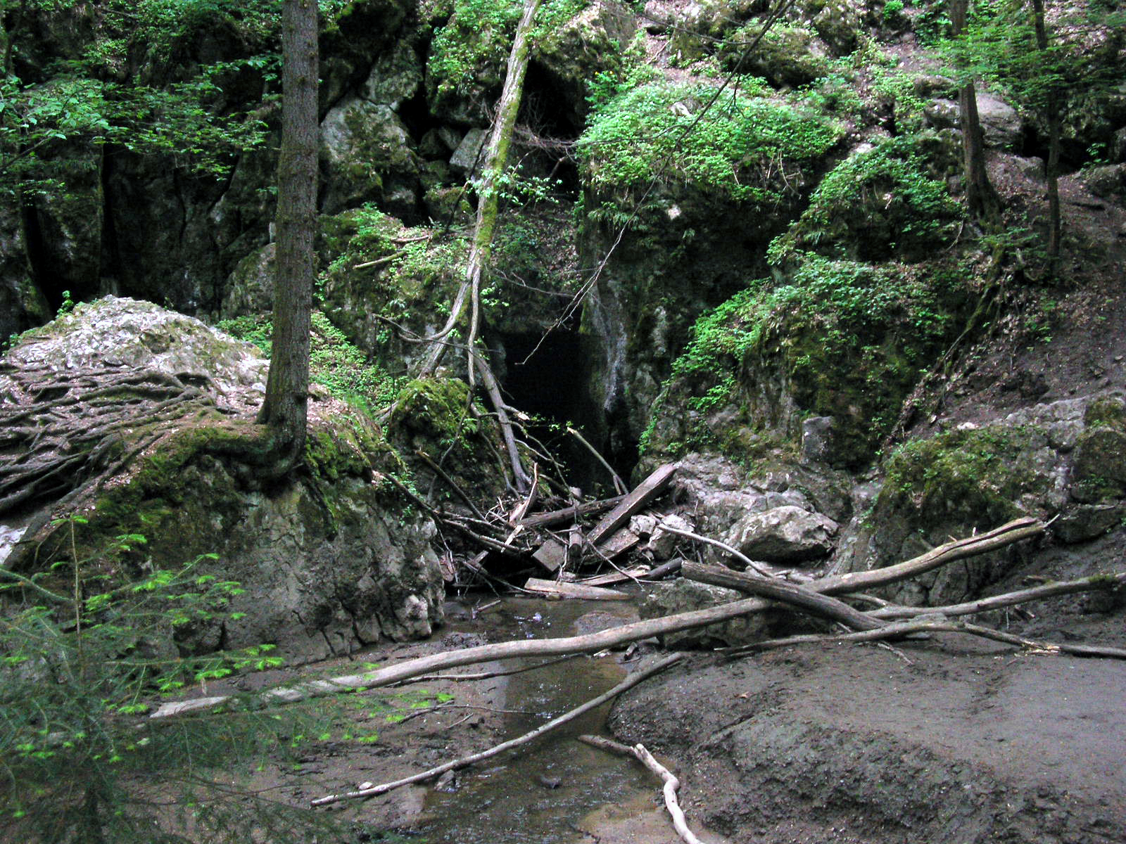 Místo propadu Jedovnického potoka - NPP Rudické propadání, okres Blansko, Jihomoravský kraj